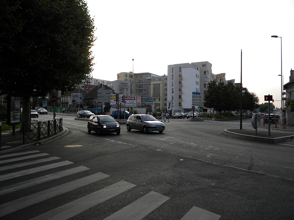 Bis Boulevard Gabriel Péri 93110 Rosny-sous-Bois, Paris, France